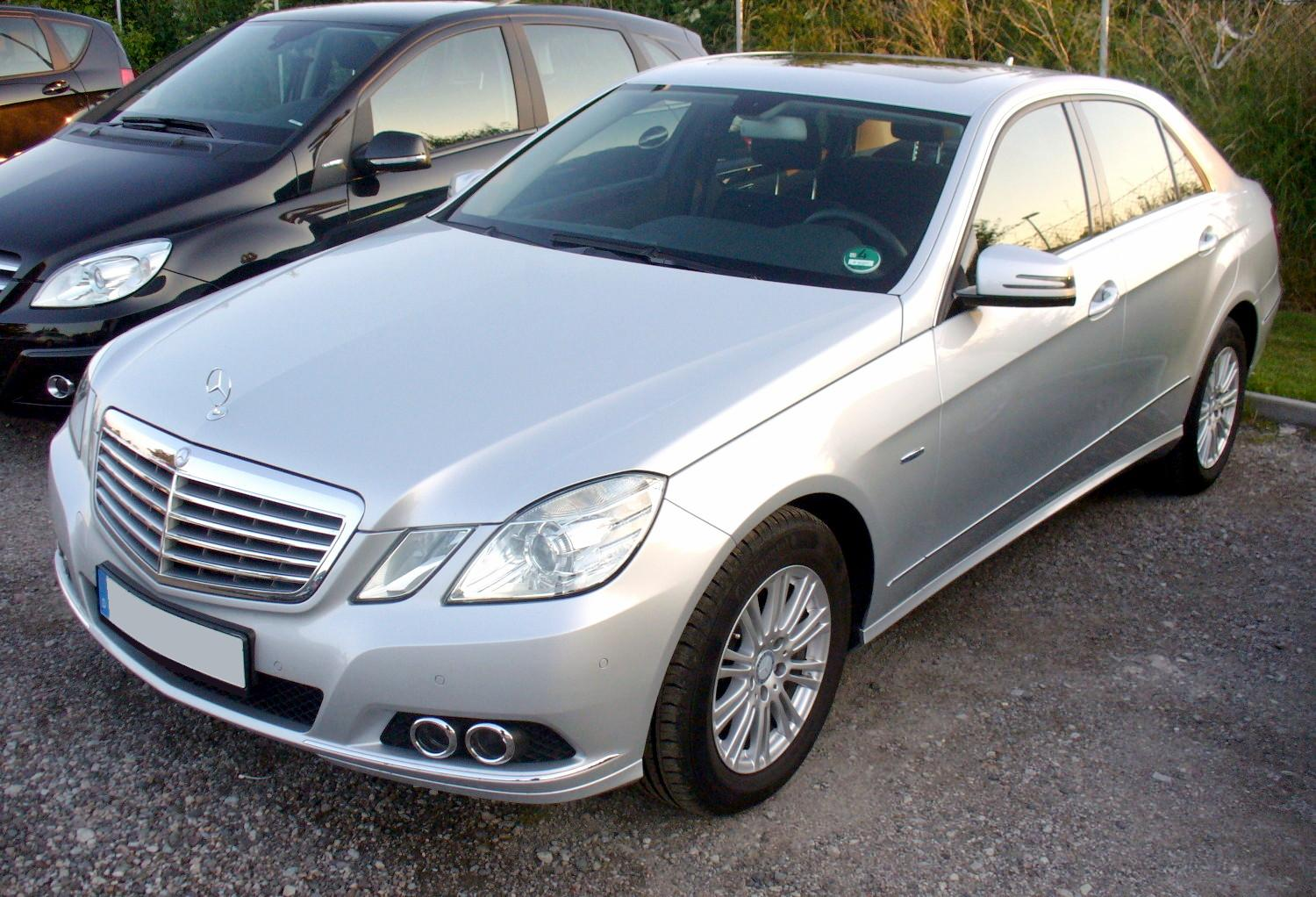 Mercedes-Benz W212